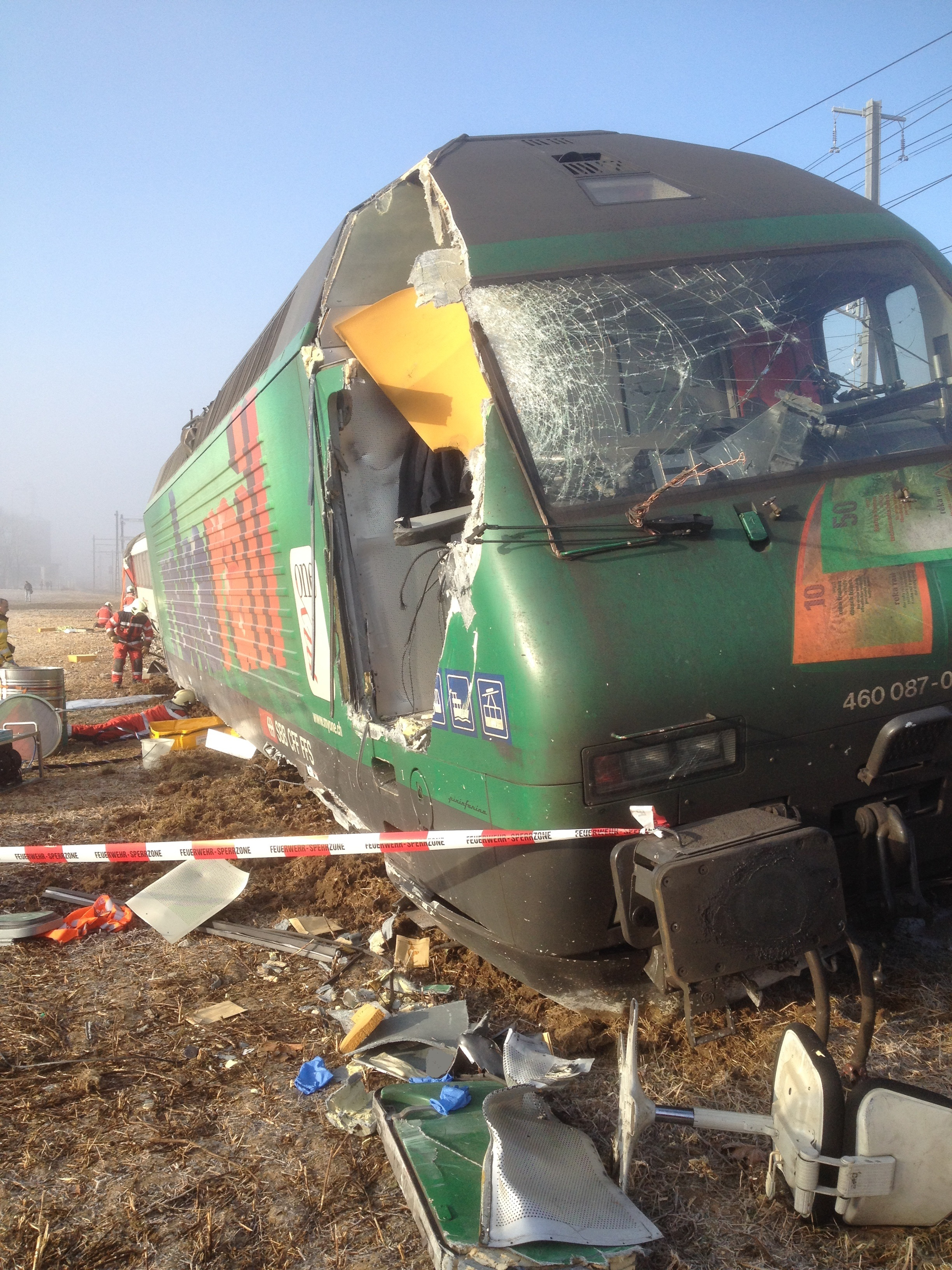 Am Freitagmorgen, 20. Februar 2015 sind im Bahnhof Rafz zwei Züge bei einer Flankenfahrt kollidiert. Um zirka 06.45 Uhr kam es zwischen dem Interregio-Zug 2858 von Zürich nach Schaffhausen und der S-Bahn-Komposition, die von Rafz nach Schaffhausen unterwegs war, zu einer Flankenkollision. Der 49-jährige Lokomotivführer wurde dabei schwer verletzt. Weitere fünf Personen zogen sich leichte Verletzungen zu.